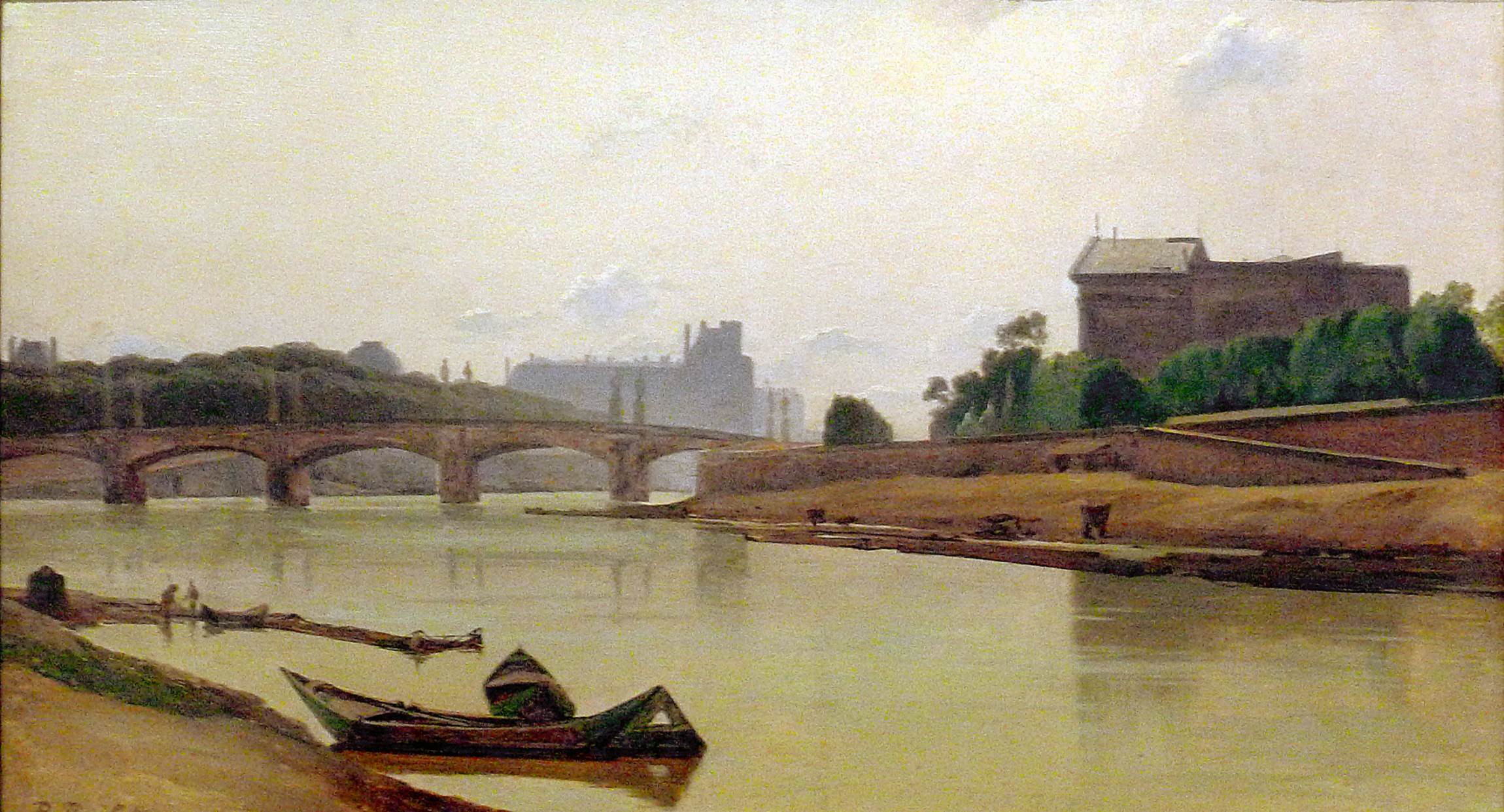 BARBOT Prosper,1830 - Pont de la Concorde à Paris (Carnavalet) - See Details' pictures (Détails – Particulari – Detalles)